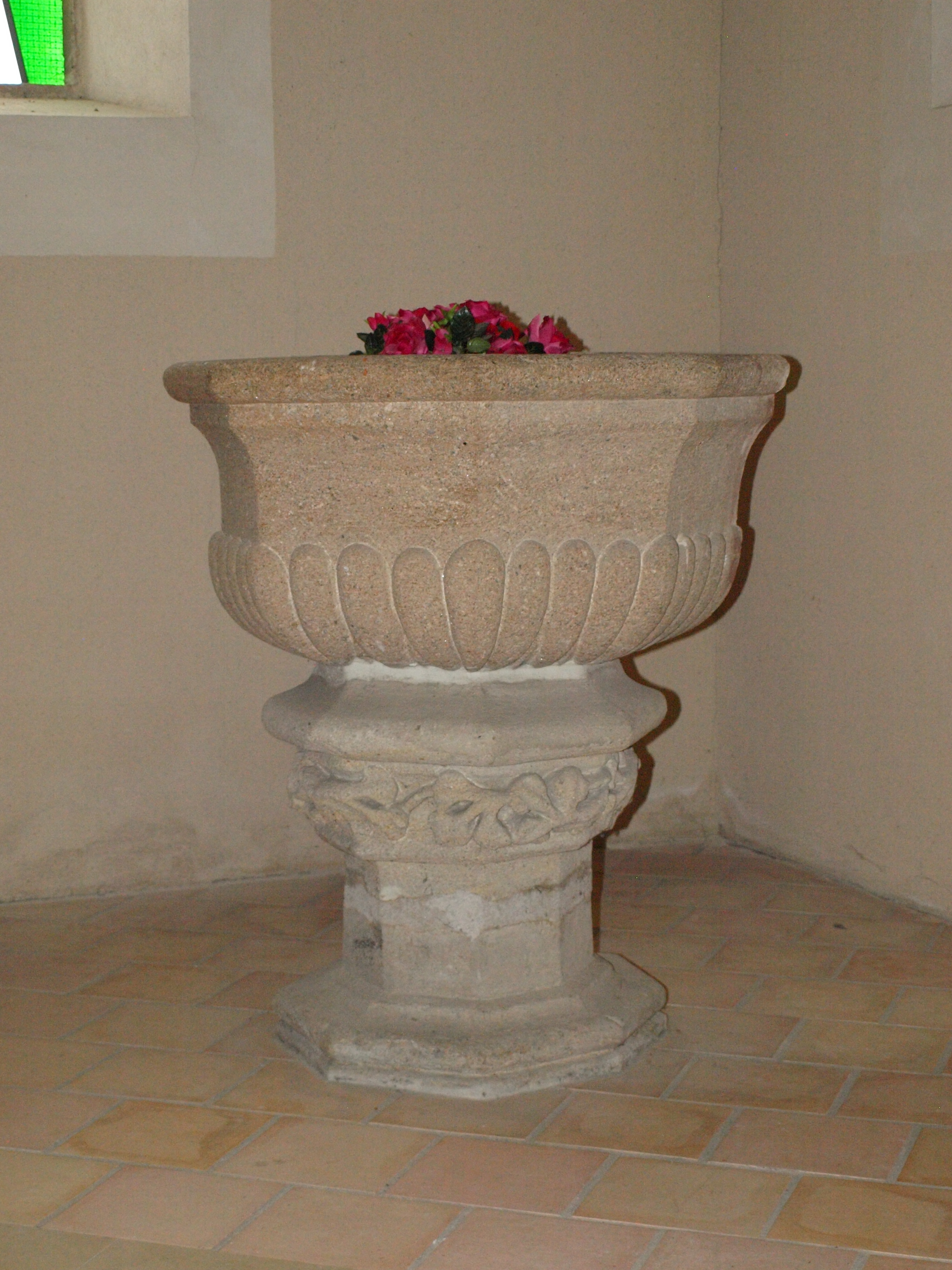 Église Notre-Dame de Hérisson (Allier, France)